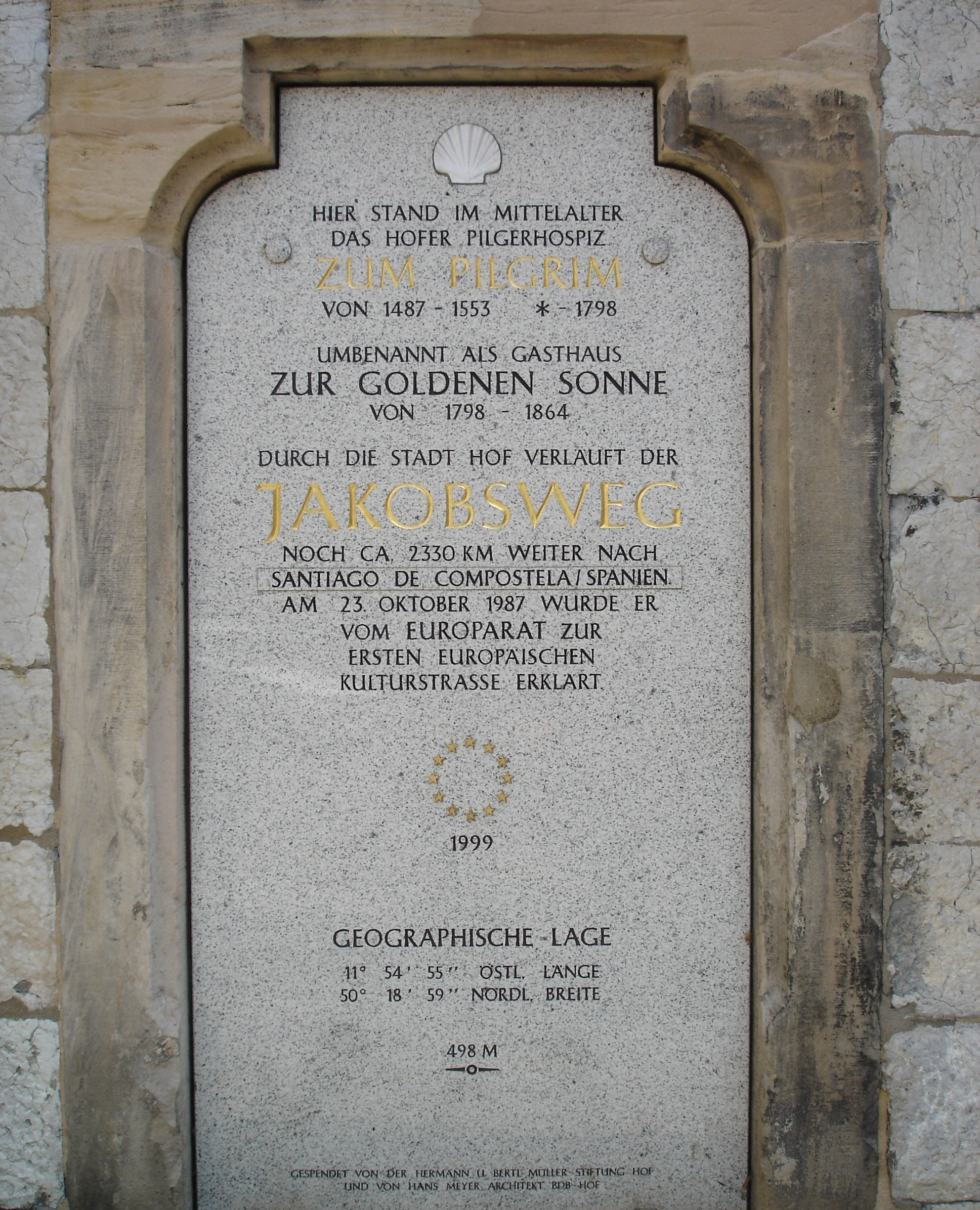 St. Marien Hof, Gedenkstein Jakobspilgerhospiz